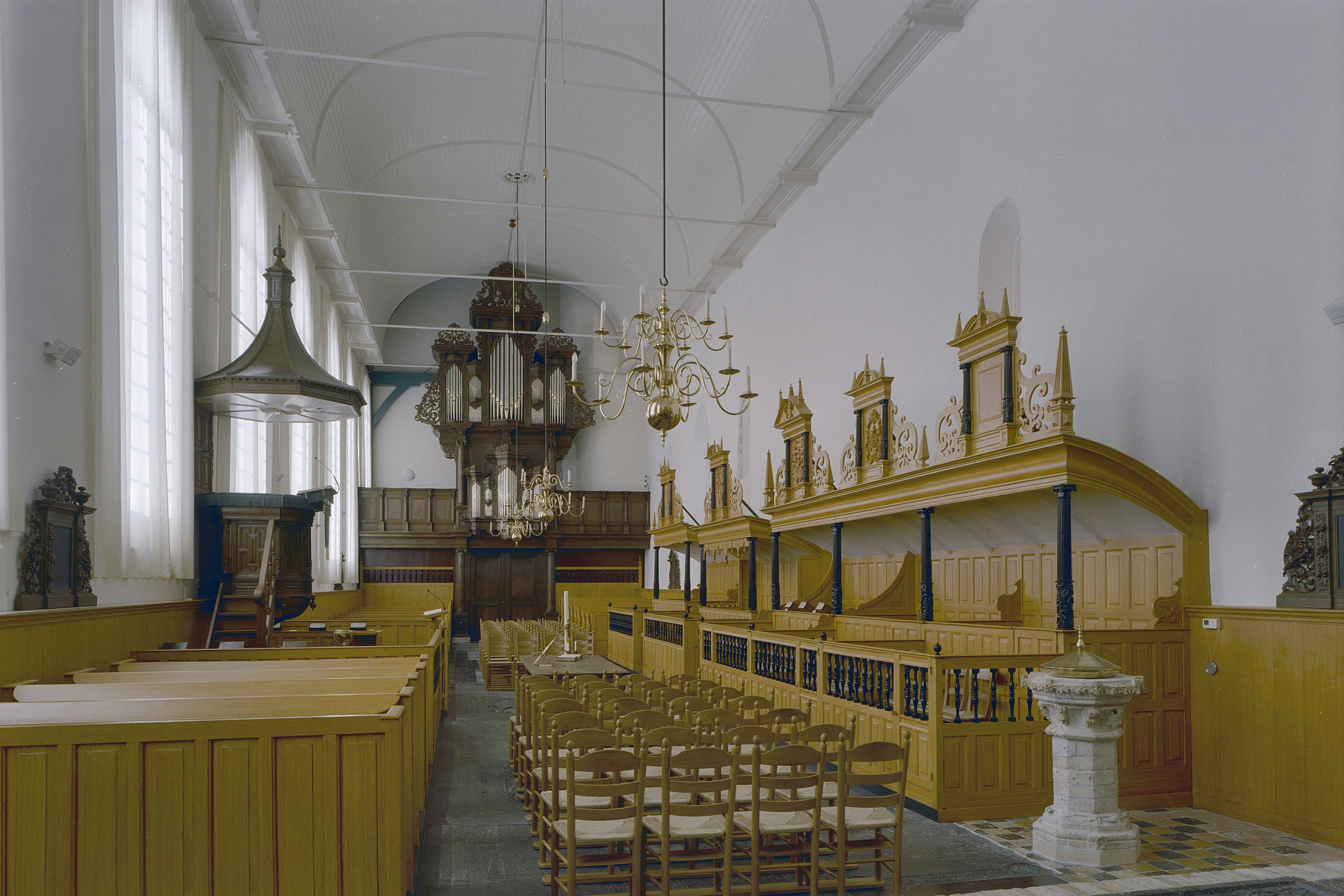 Nederlands Hervormde Kerk: Interieur, overzicht naar het orgel met preekstoel,herenbanken en doopvont